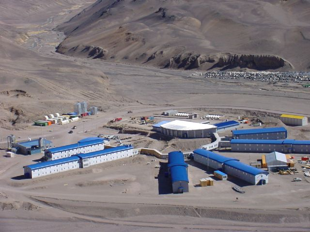 Mina Veladero, ubicada en la Crdillera de los Andes en el departamento Iglesia, provincia de San Juan, Argentina